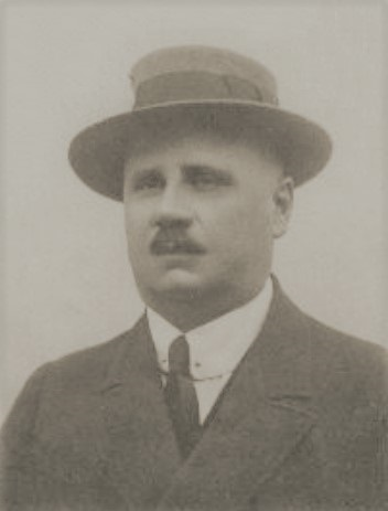 Hertelendi és vindornyalaki Hertelendy Ferenc (1859–1919), főrendiház tagja, zalai és később temesi főispán, a "Zalamegyei Gazdasági Egyesület" elnöke, földbirtokos, vármegyei bizottsági tag.